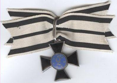 Order of Louise (Luisen-Orden), First Class